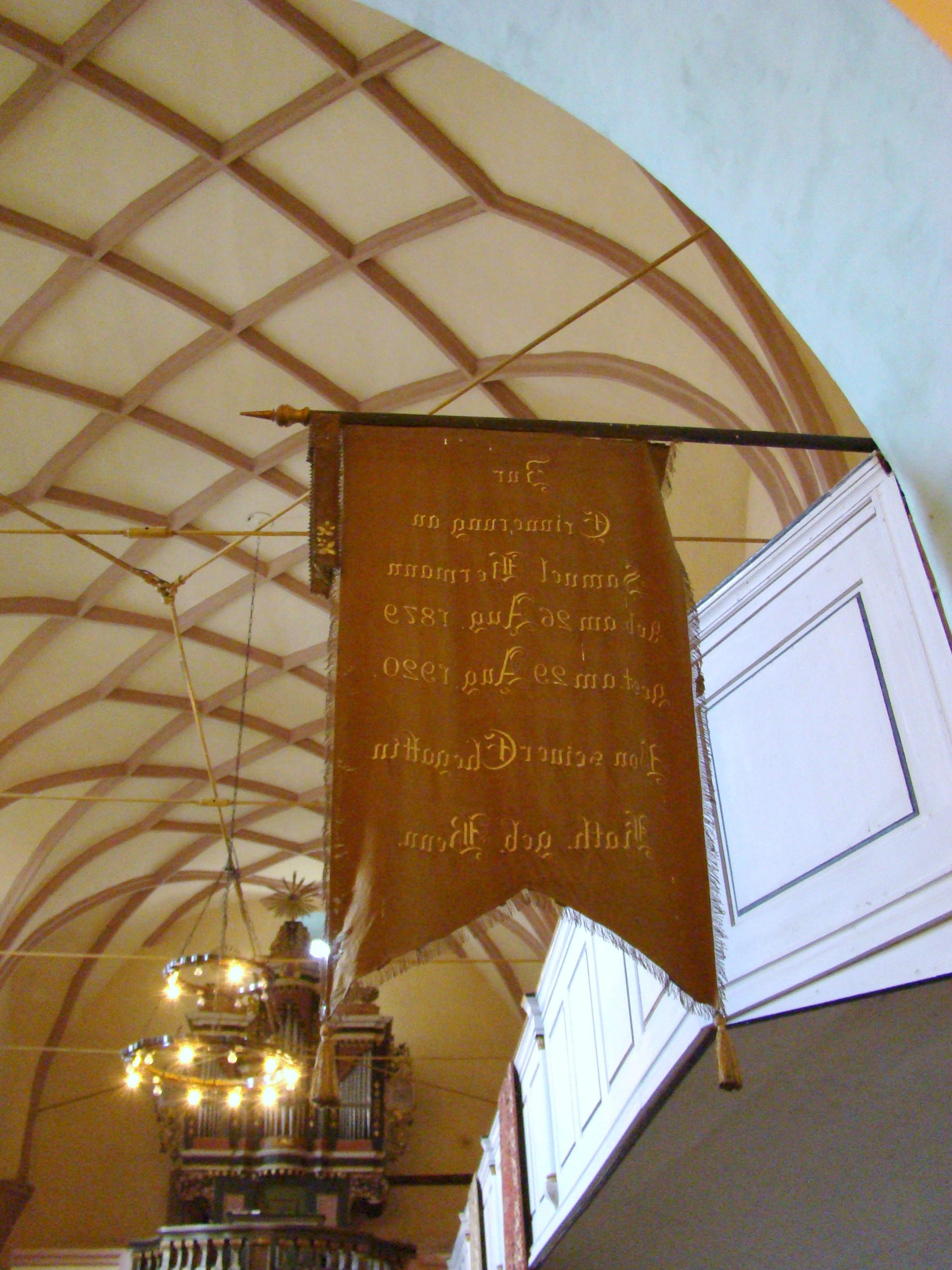 Biserica evanghelică fortificată, sat BAZNA; comuna BAZNA, județul Sibiu 01